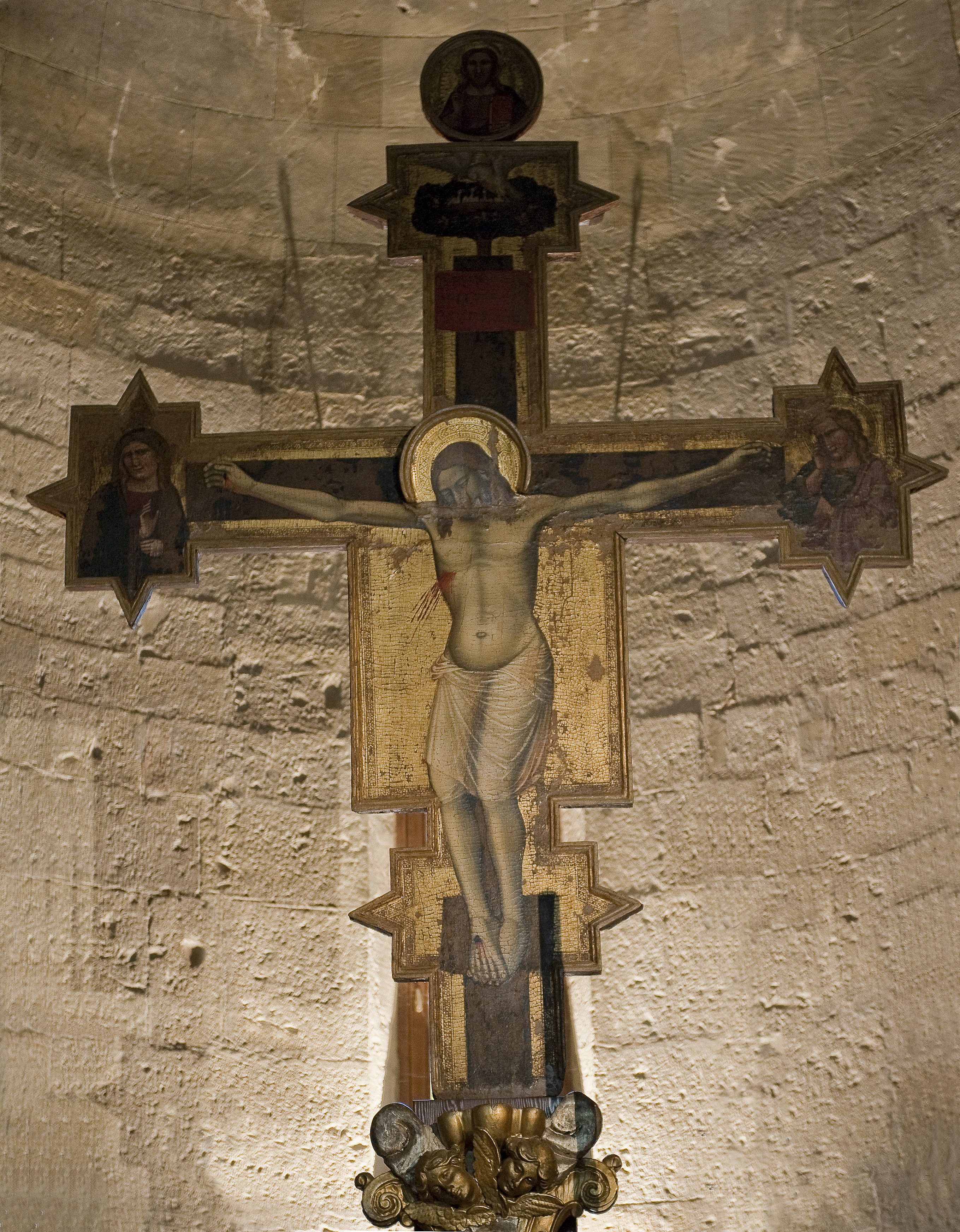 Crocifisso di scuola giottesca (XIV secolo) posto nella pieve di San Donato in Poggio